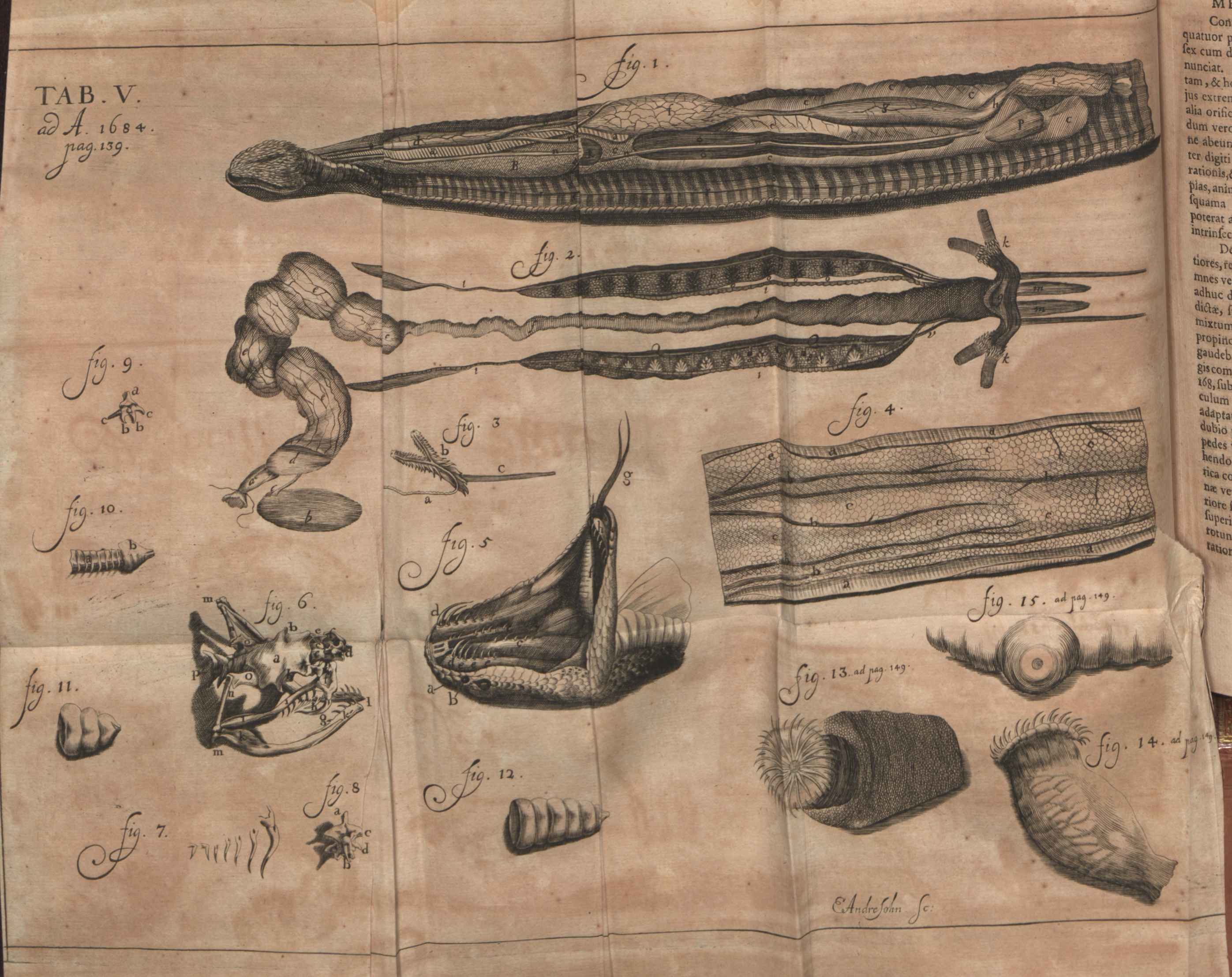 Illustration